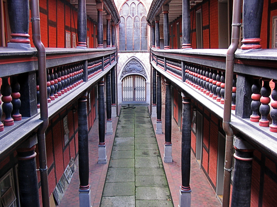 Beschreibung: Heilgeistkloster Fotograf: Darkone, 24. September 2004